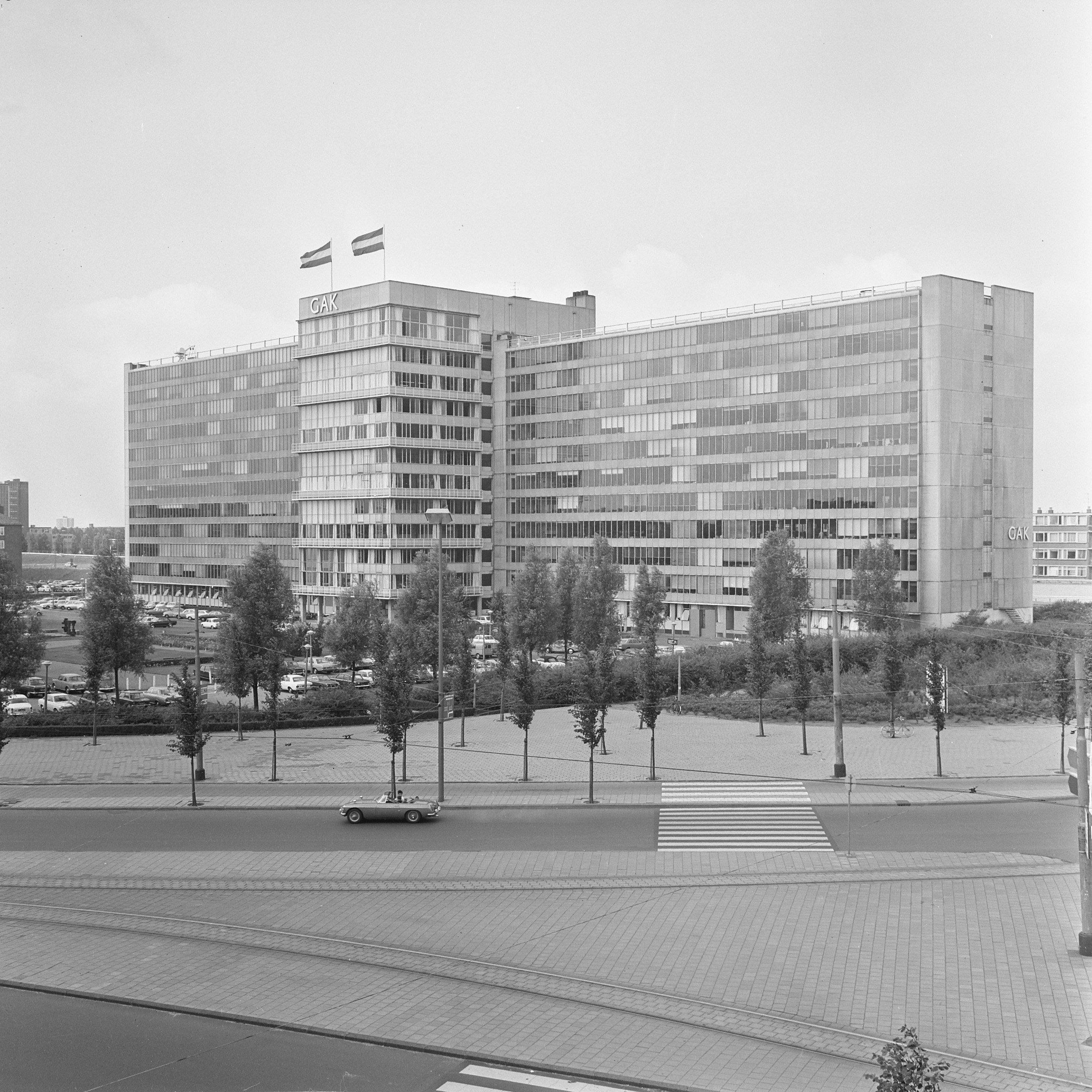 Collectie / Archief : Fotocollectie Anefo Reportage / Serie : Opdracht GAK; GAK-gebouw (Gemeenschappelijk Administratie Kantoor) Beschrijving : gebouwen Datum : 6 augustus 1969 Locatie : Amsterdam, Noord-Holland Trefwoorden : gebouwen Fotograaf : Evers, Joost / Anefo Auteursrechthebbende : Nationaal Archief Materiaalsoort : Negatief (zwart/wit) Nummer archiefinventaris : bekijk toegang 2.24.01.03 Bestanddeelnummer : 922-6845